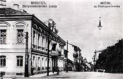 Здание Минского дворянского депутатского собрания.